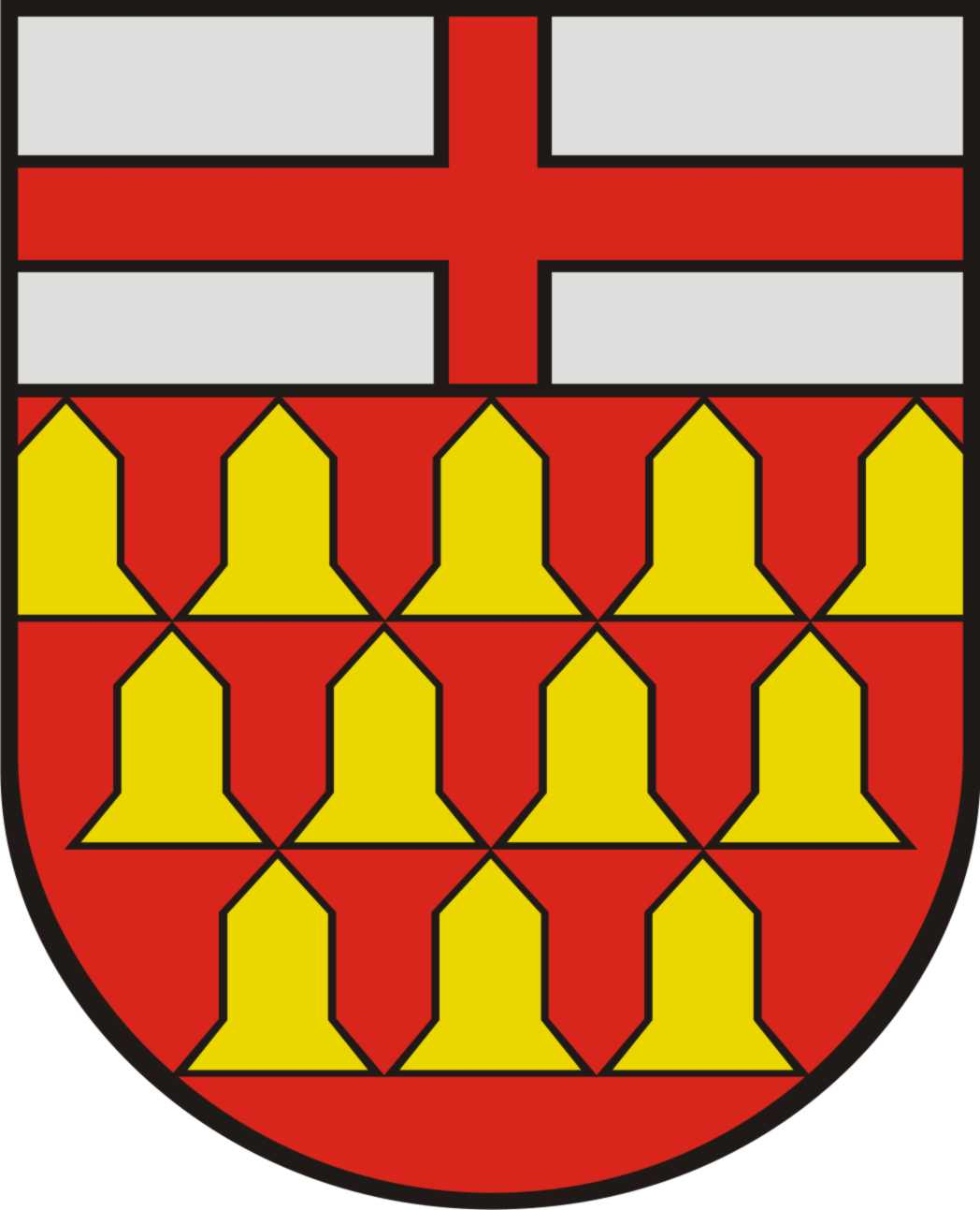 Wappen der Stadt Wadern